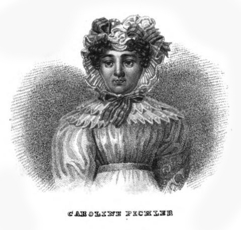 Caroline Pichler, aus: Anthologie aus den sämmtlichen Werken von C. Pichler, 1830